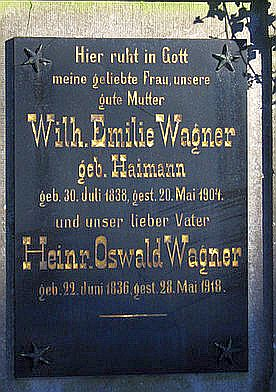 Grabstein Wagner